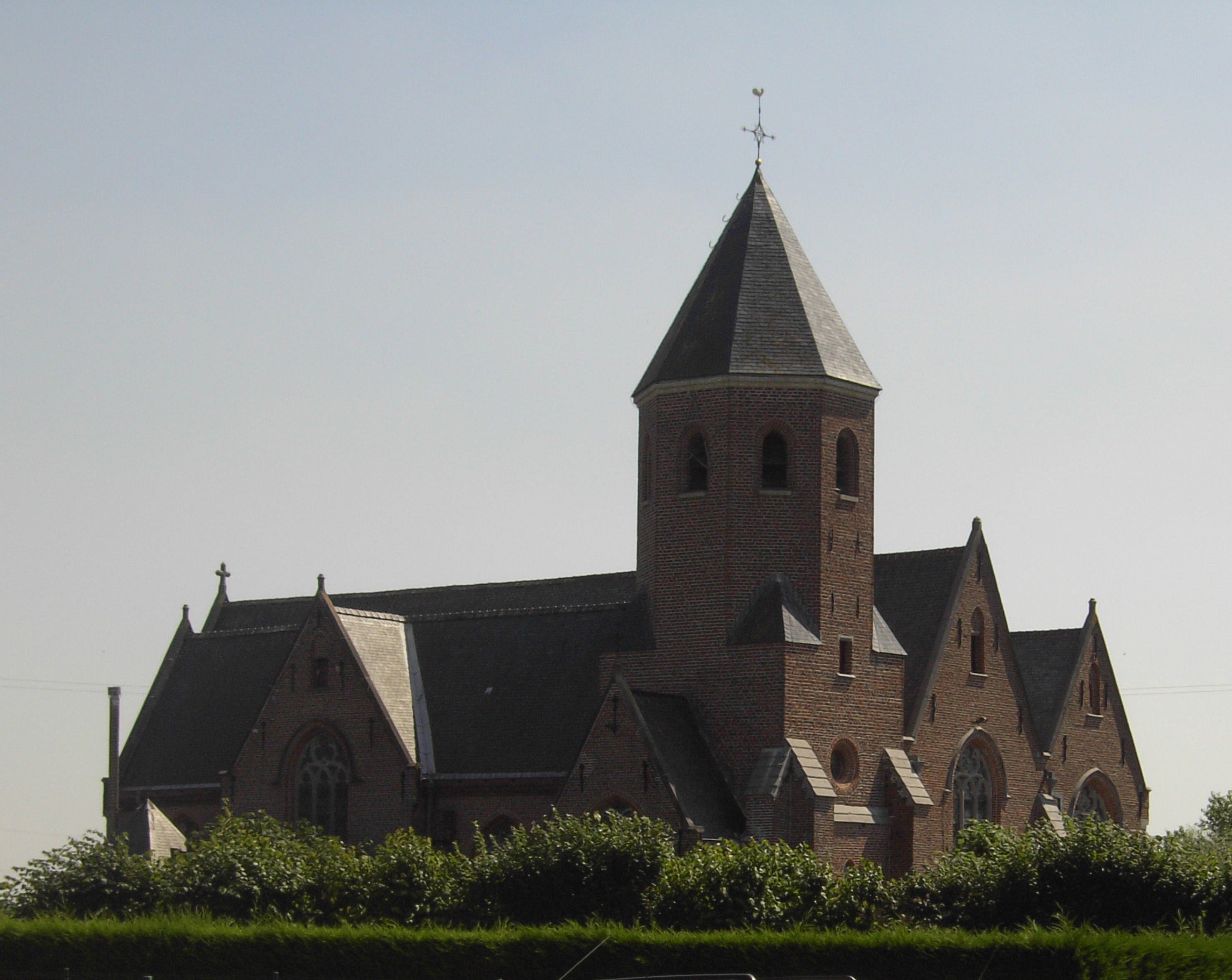 Church - Grammene (Deinze) - Oost-Vlaanderen - België